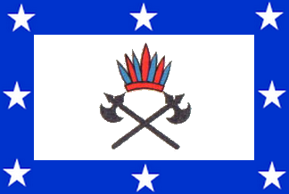 Bandeira de Pongaí - SP - Brasil.